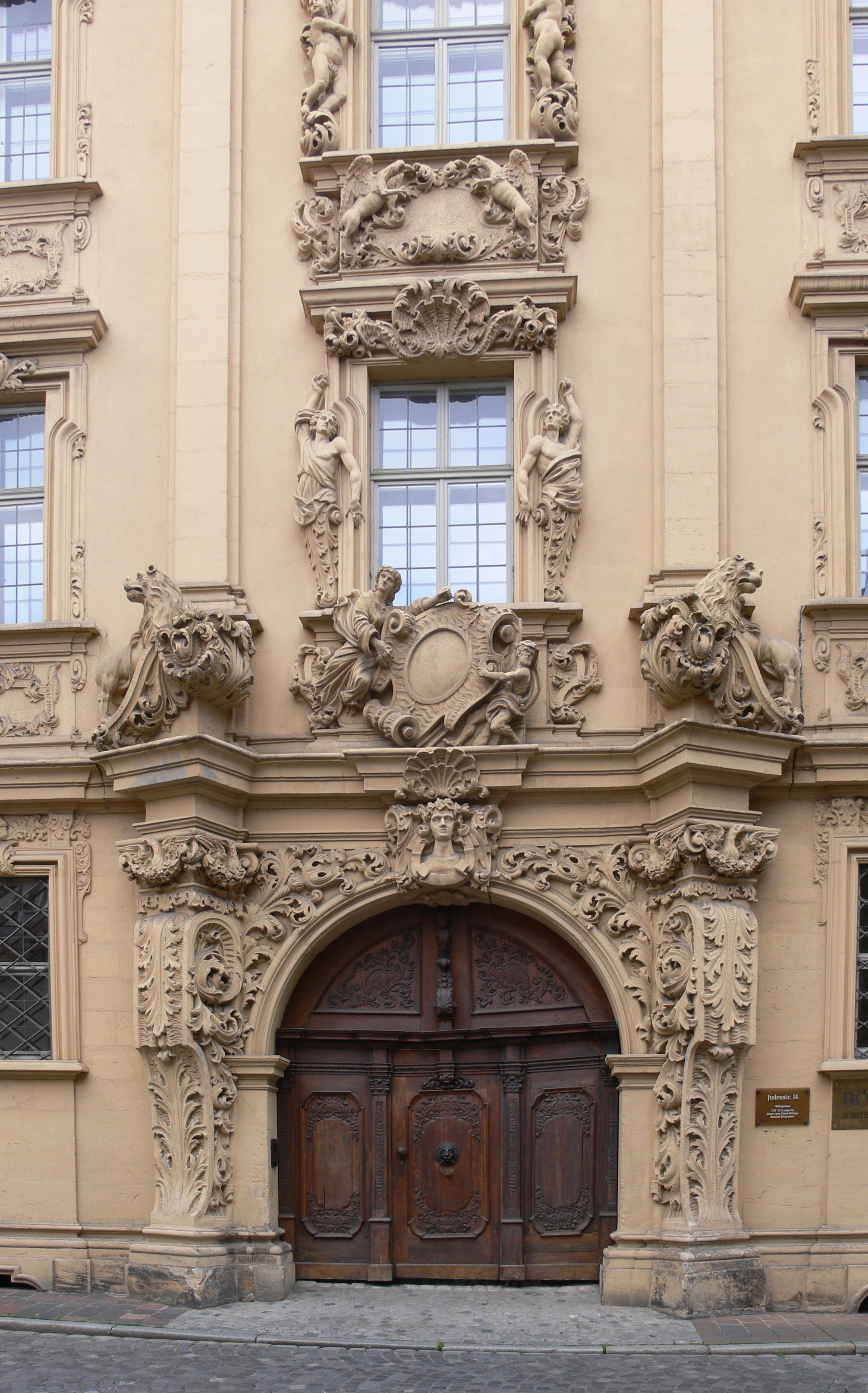 Bamberg, Haus Judenstraße 14, Portal